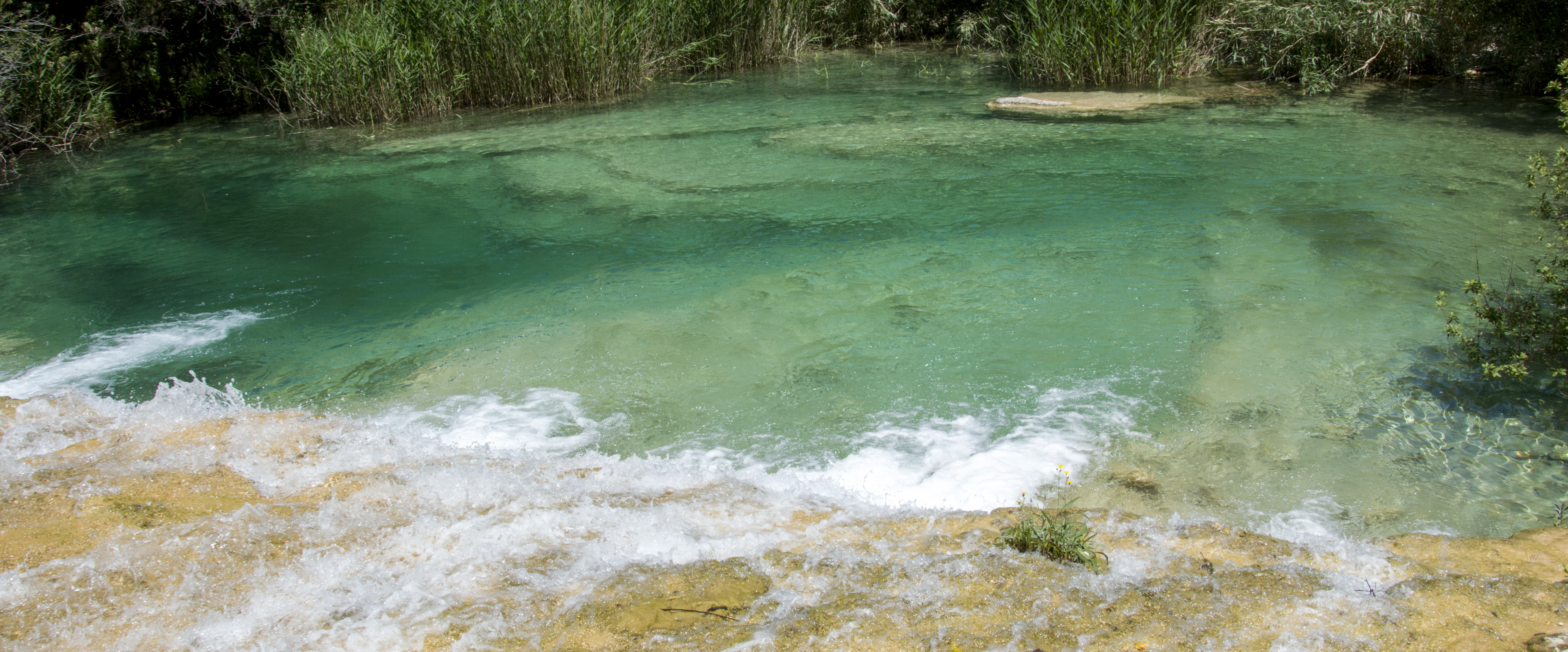 Laghetti di Avola